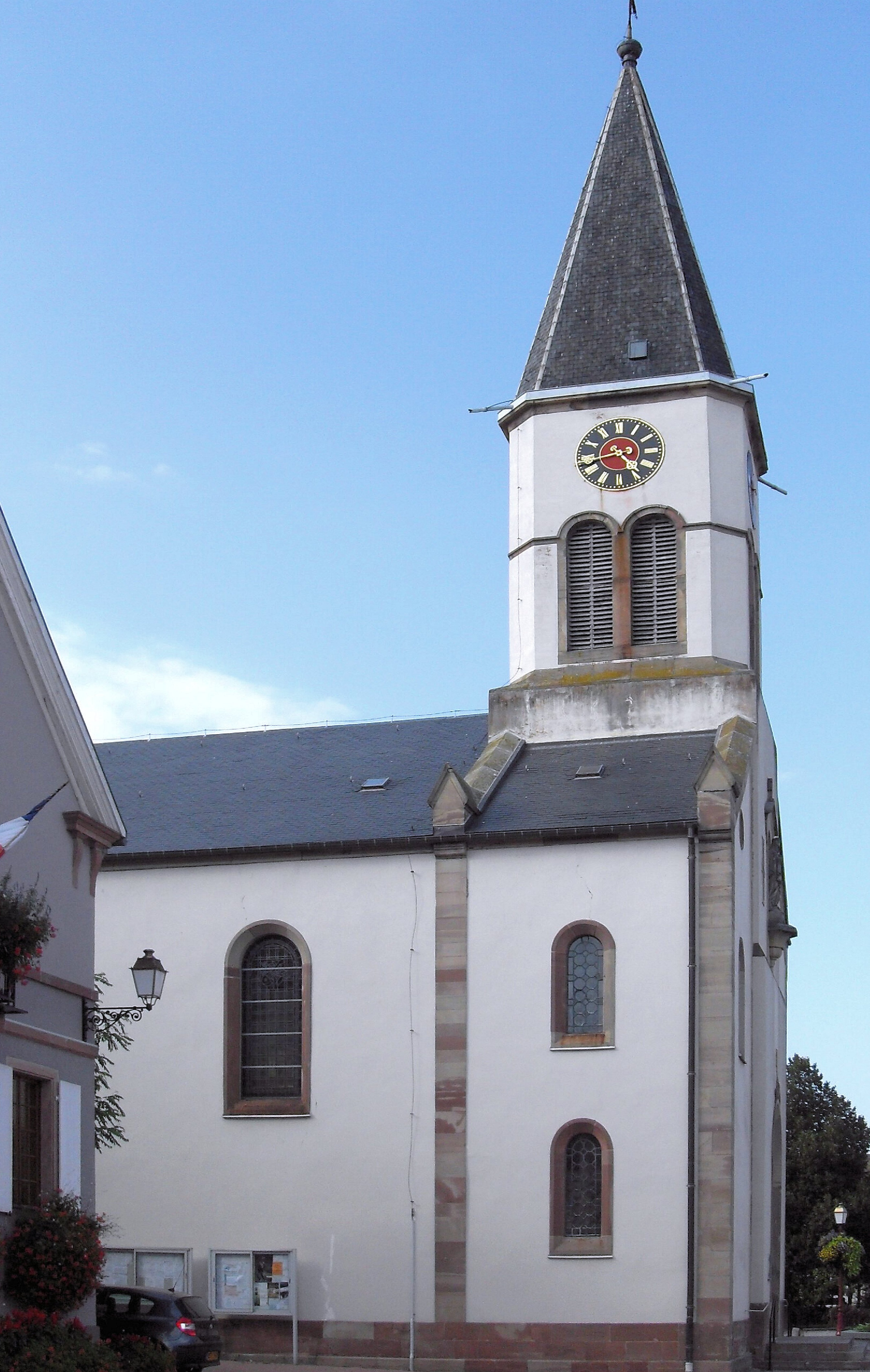 L'église Saint-Jacques-le-Majeur dElsenheim